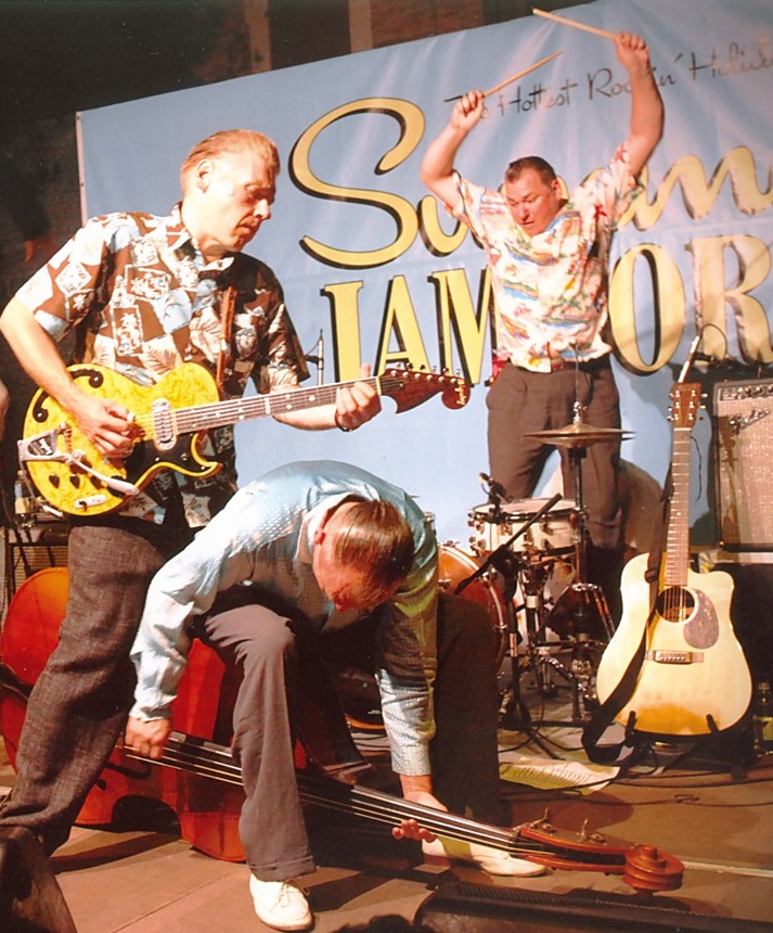 Wildfire Willie